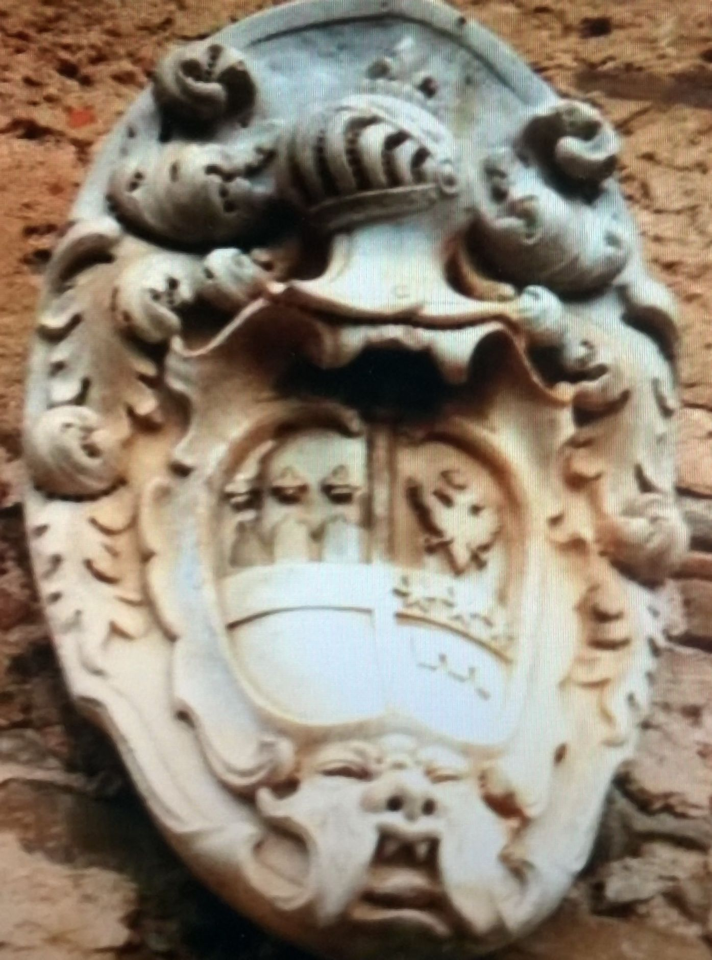 Stemma personale di Giancola del Mercato diviso tra il paterno e materno de' Pasca